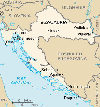 Versione della cartina croata con nomi topografici tipicamente italiani